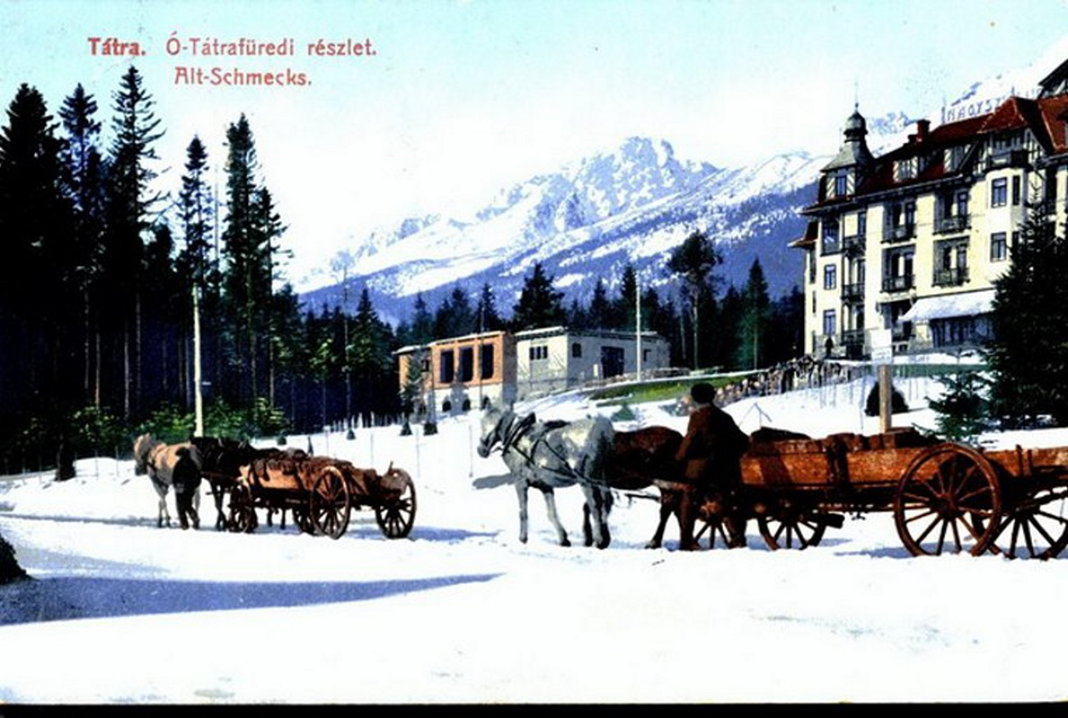 Pod hotelom Grand